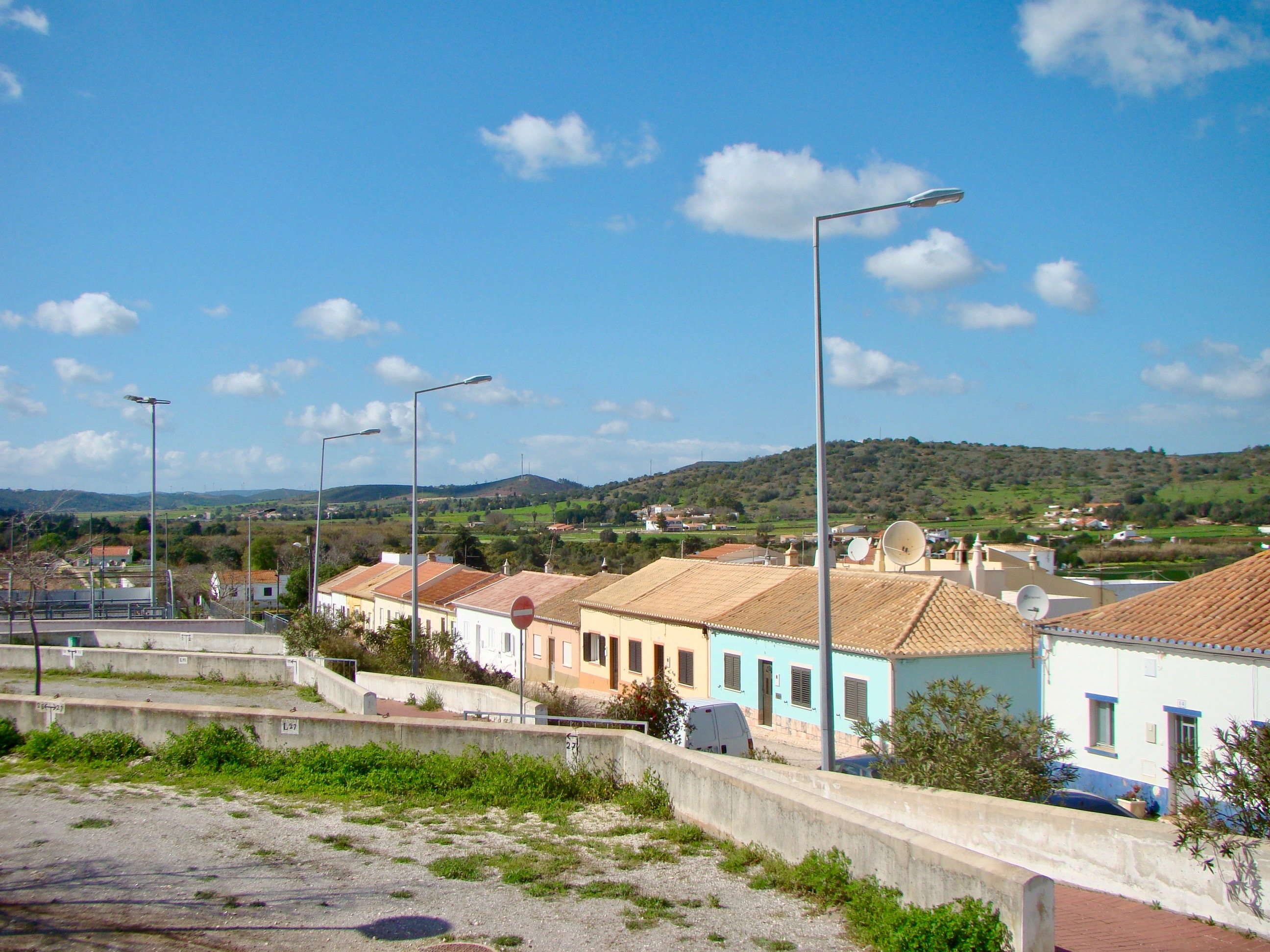 Vista de uma parte de Odiáxere, Algarve, em Março de 2018.